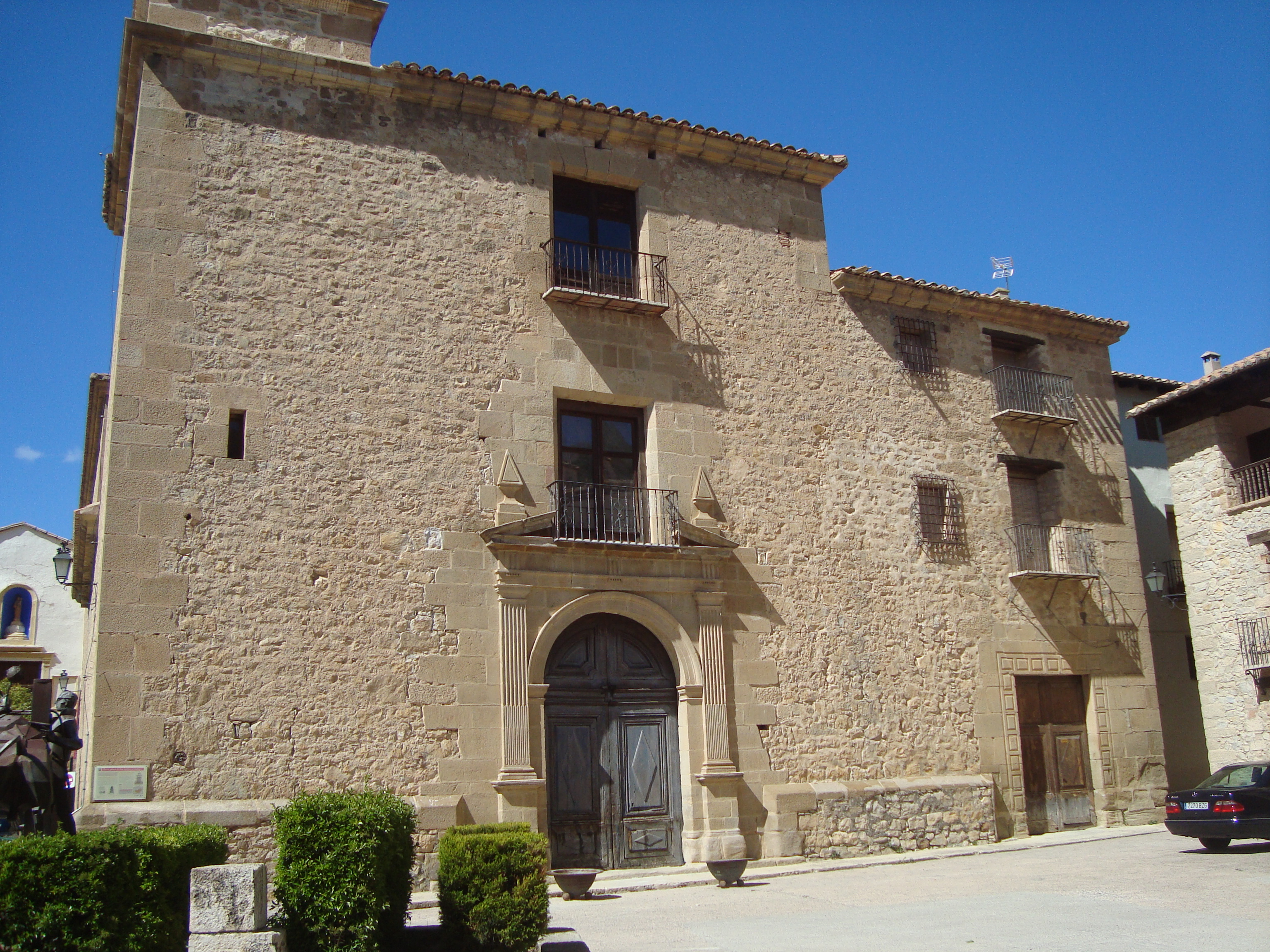 Iglesia de San José del antiguo Convento de las Carmelitas (Rubielos de Mora)